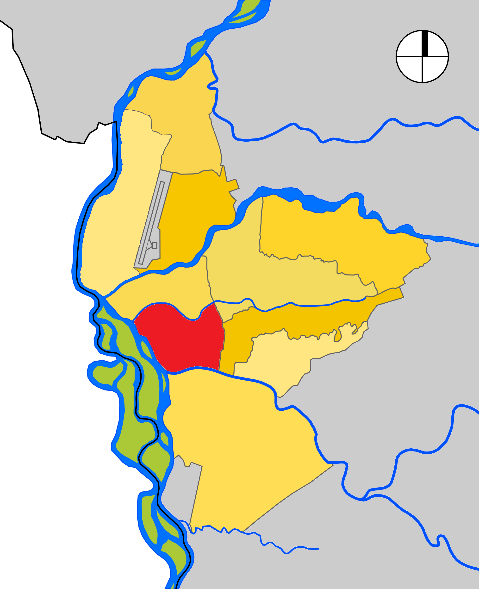 Mapa de las Comuna 4 de Neiva, departamento del Huila, Colombia.